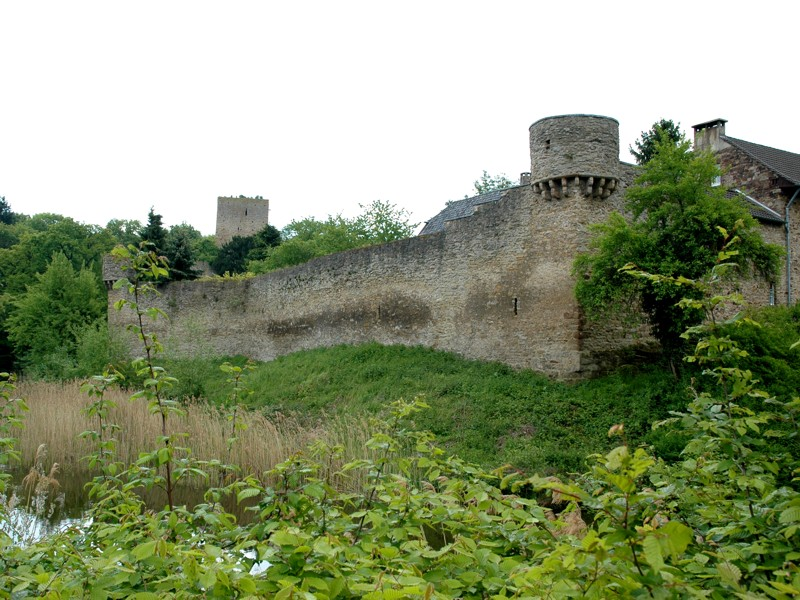 Die Hardtburg aus Nordosten